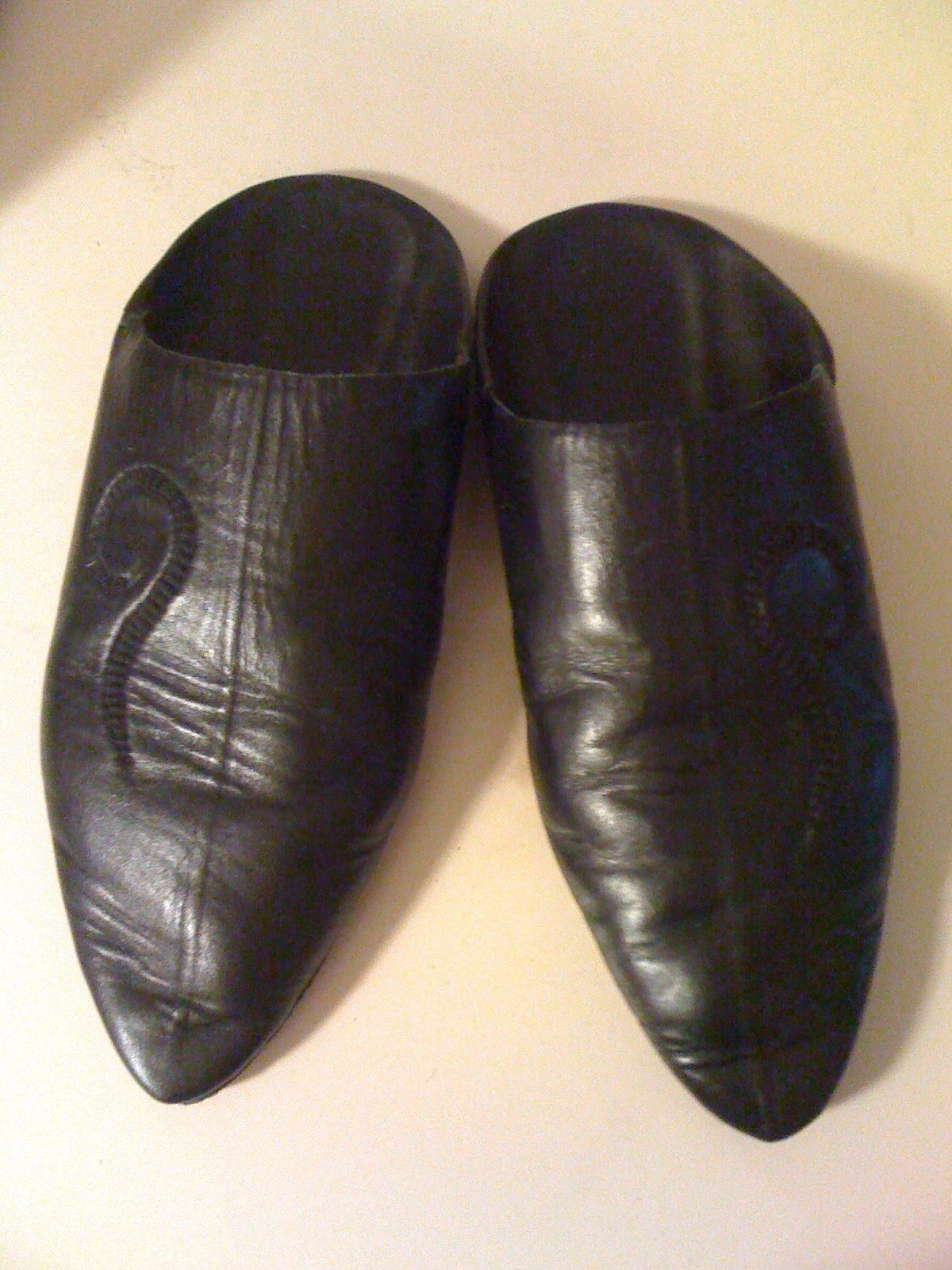 Babouches du Maroc